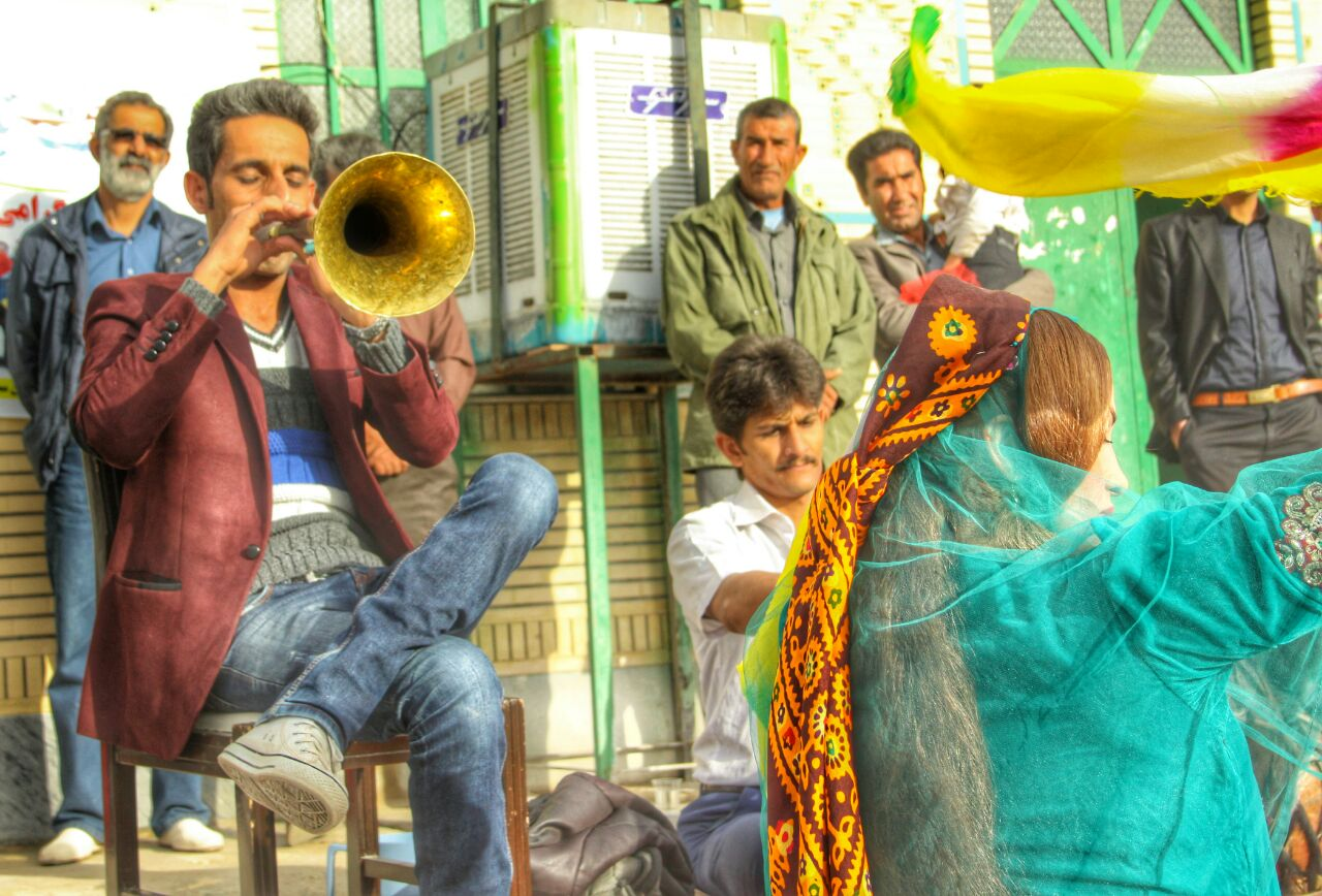 A Lurish musician performing Sorna at a wedding ceremony